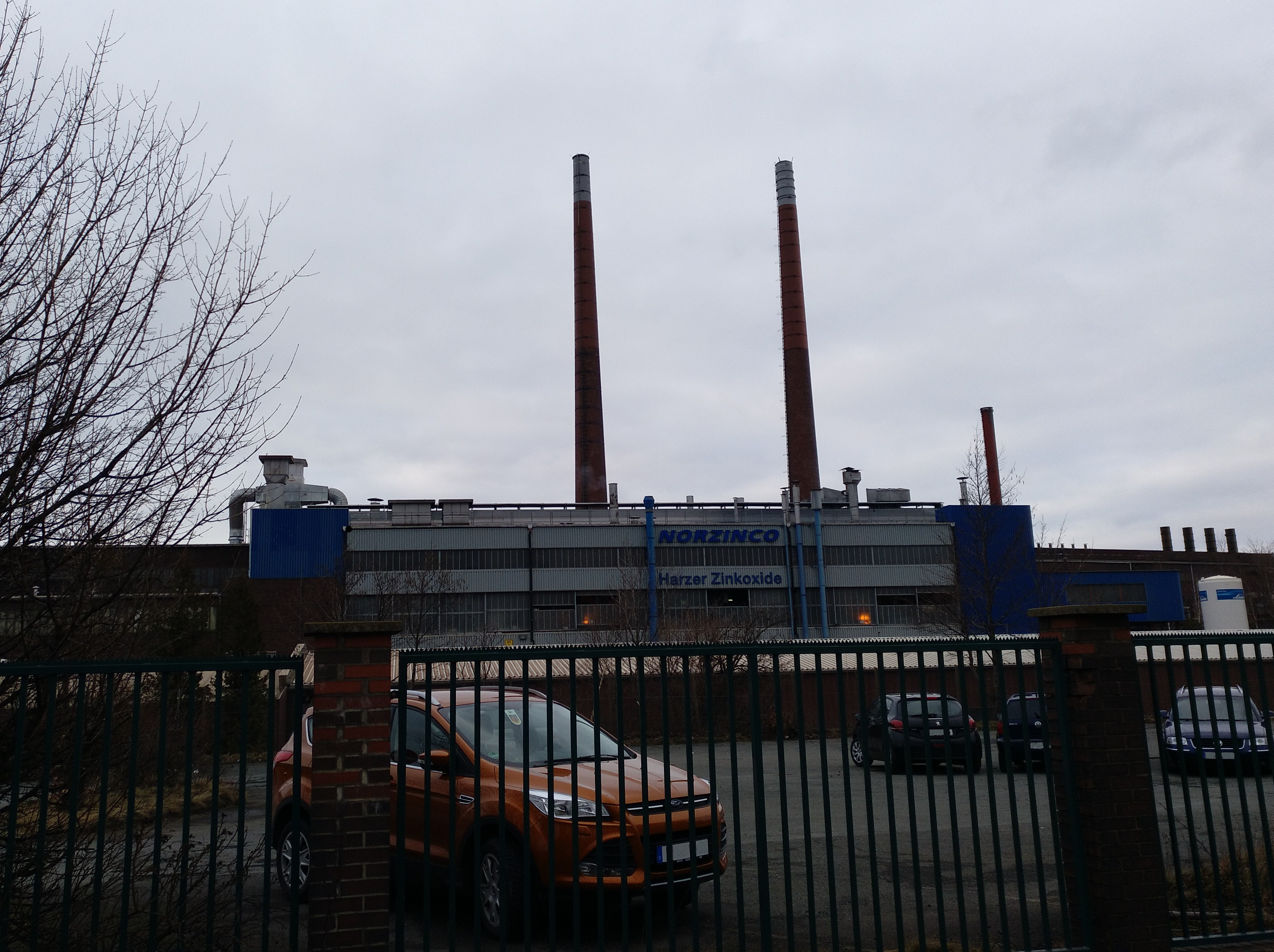 Eingangsbereich der NORZINCO GmbH. Kennzeichen und weitere Rückschlüsse auf die Kraftwagenbesitzer wurden zur Wahrung der Privatsphäre herausretuschiert.